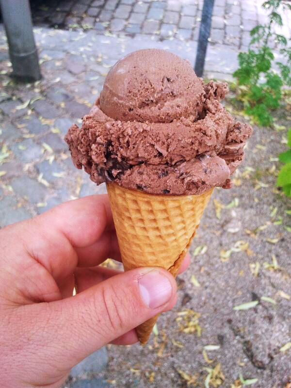 A chocolate ice cream cone